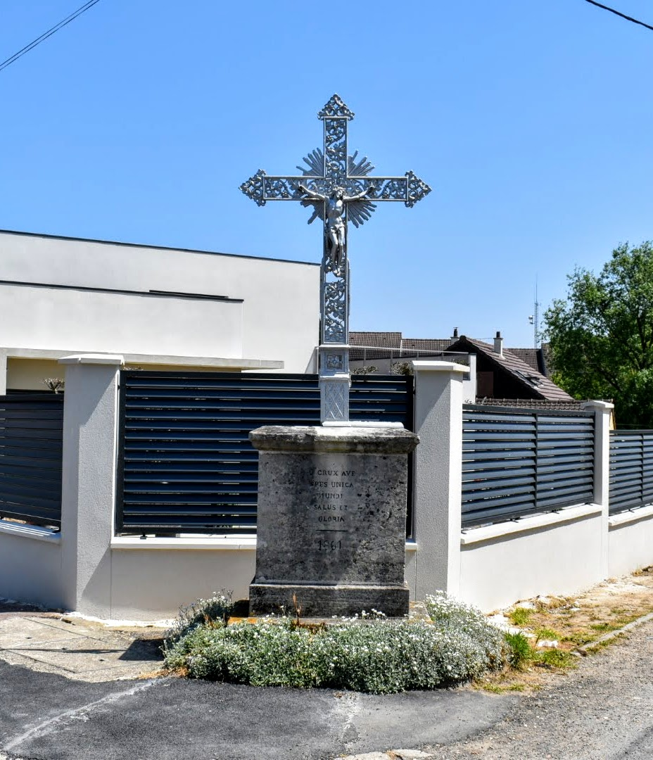 les inscriptions du socle . " O CRUX AVE -SPES UNICA MUNDI - SALUS ET GLORIA 1861 " "Oh croix je te salue seul espoir du monde qui donne la sécurité et la gloire 1861".